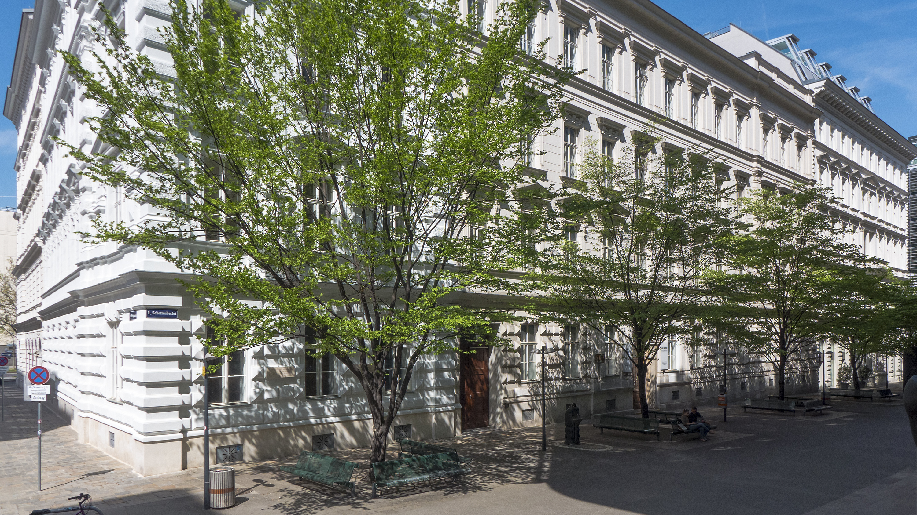 Realgymnasium Schottenbastei in Wien 1